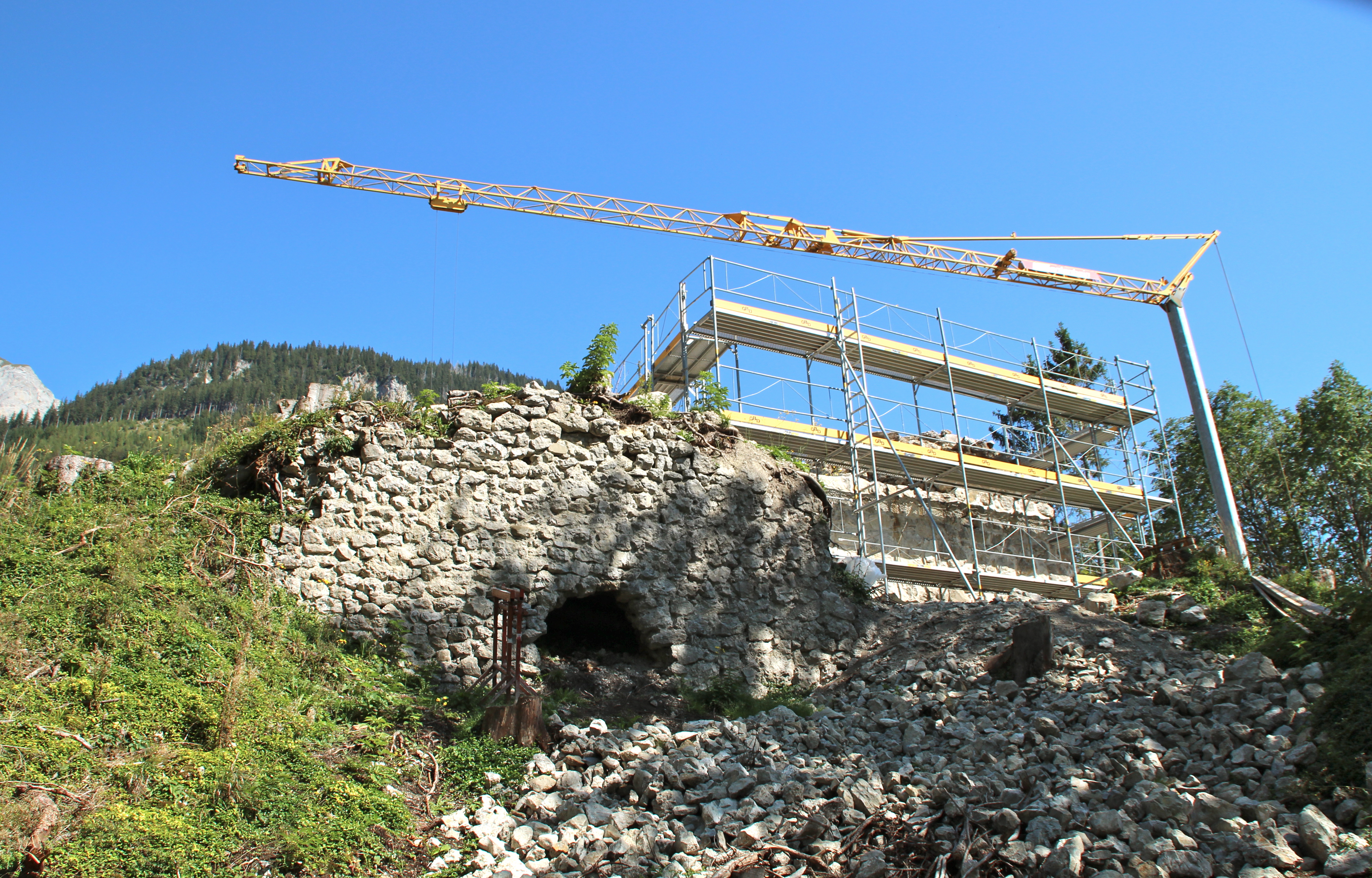 Wildhaus